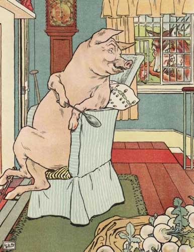 L. Leslie Brooke, Les trois petits cochons : "Trop tard, je suis déjà allé chercher les navets", dit le cochon au loup.